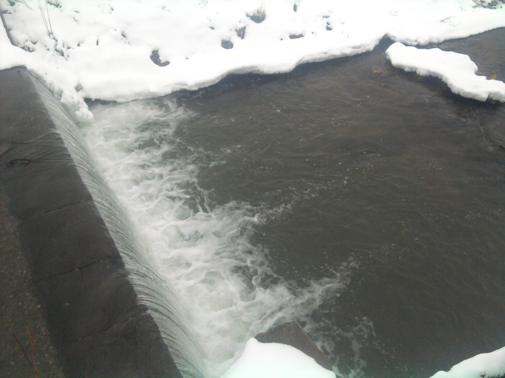 Topoľčany, Slovakia